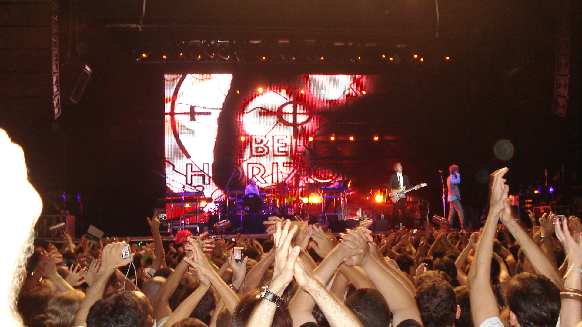 Foto tirada durante show do A-HA em Belo Horizonte, 2010.